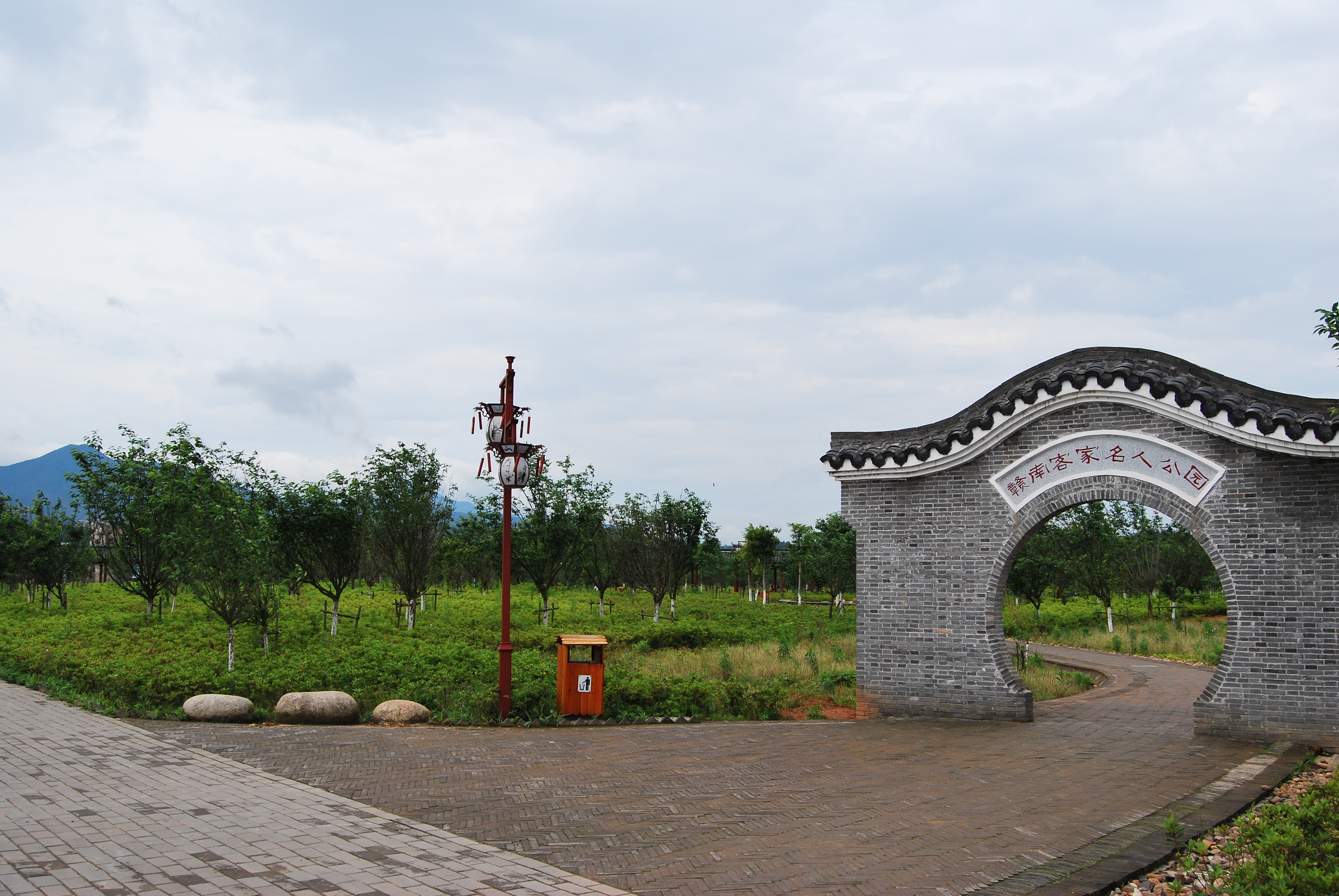 客家名人公园